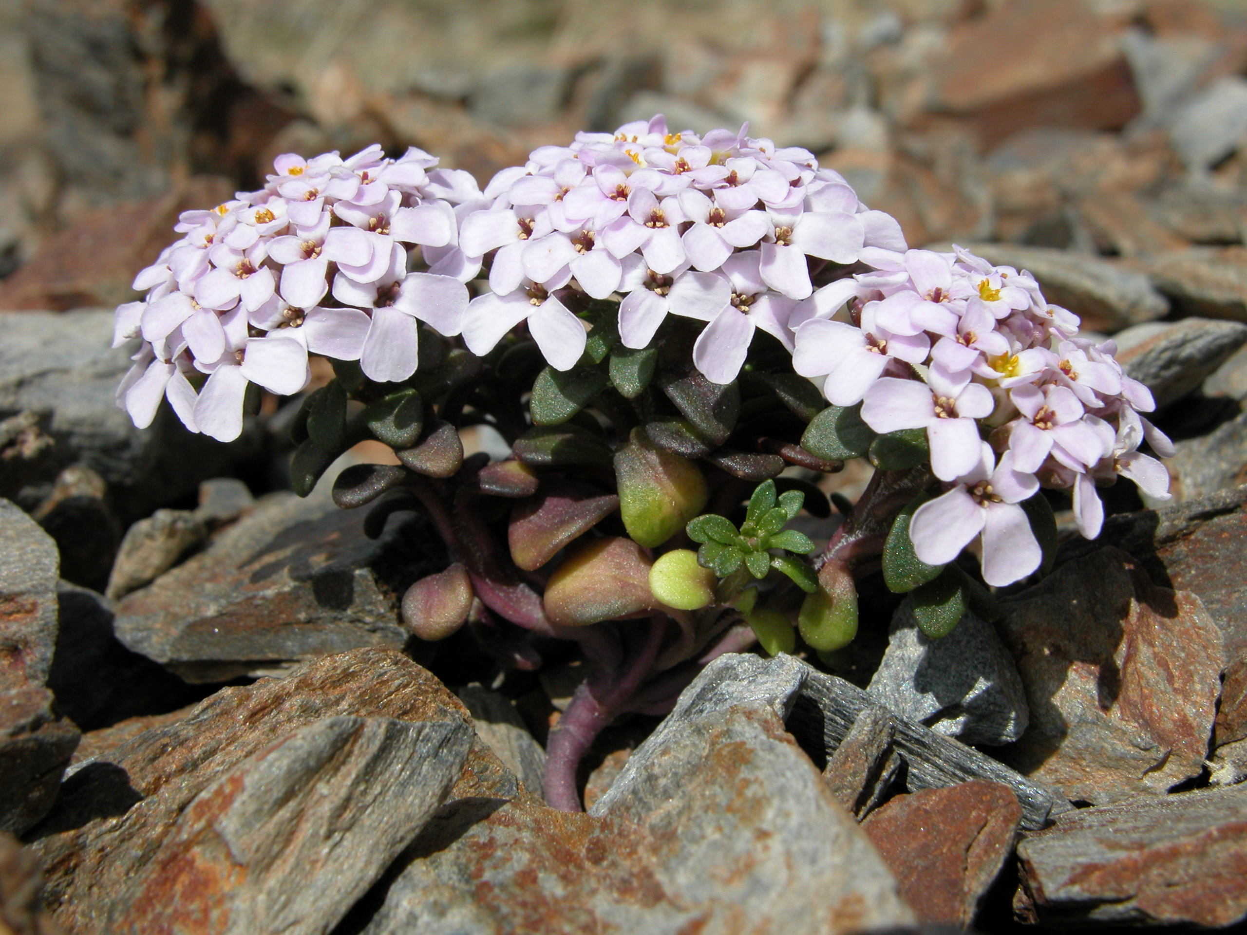 Ibéris spatulé, photo prise dans la vallée d'Eyne, Pyrénées Orientales, France